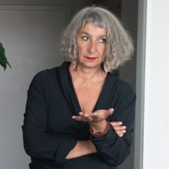 Adrienne Goehler (2016) in Zusammenarbeit mit Wenke Seemann; alle Rechte liegen bei mir.